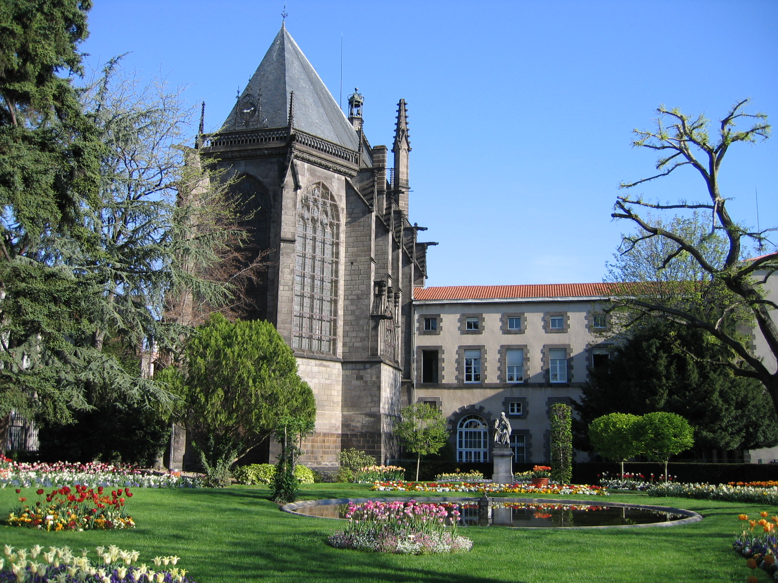 France, Auvergne, Puy-de-Dôme, Riom, la Sainte-Chapelle Auteur Jean-Marc Aubelle